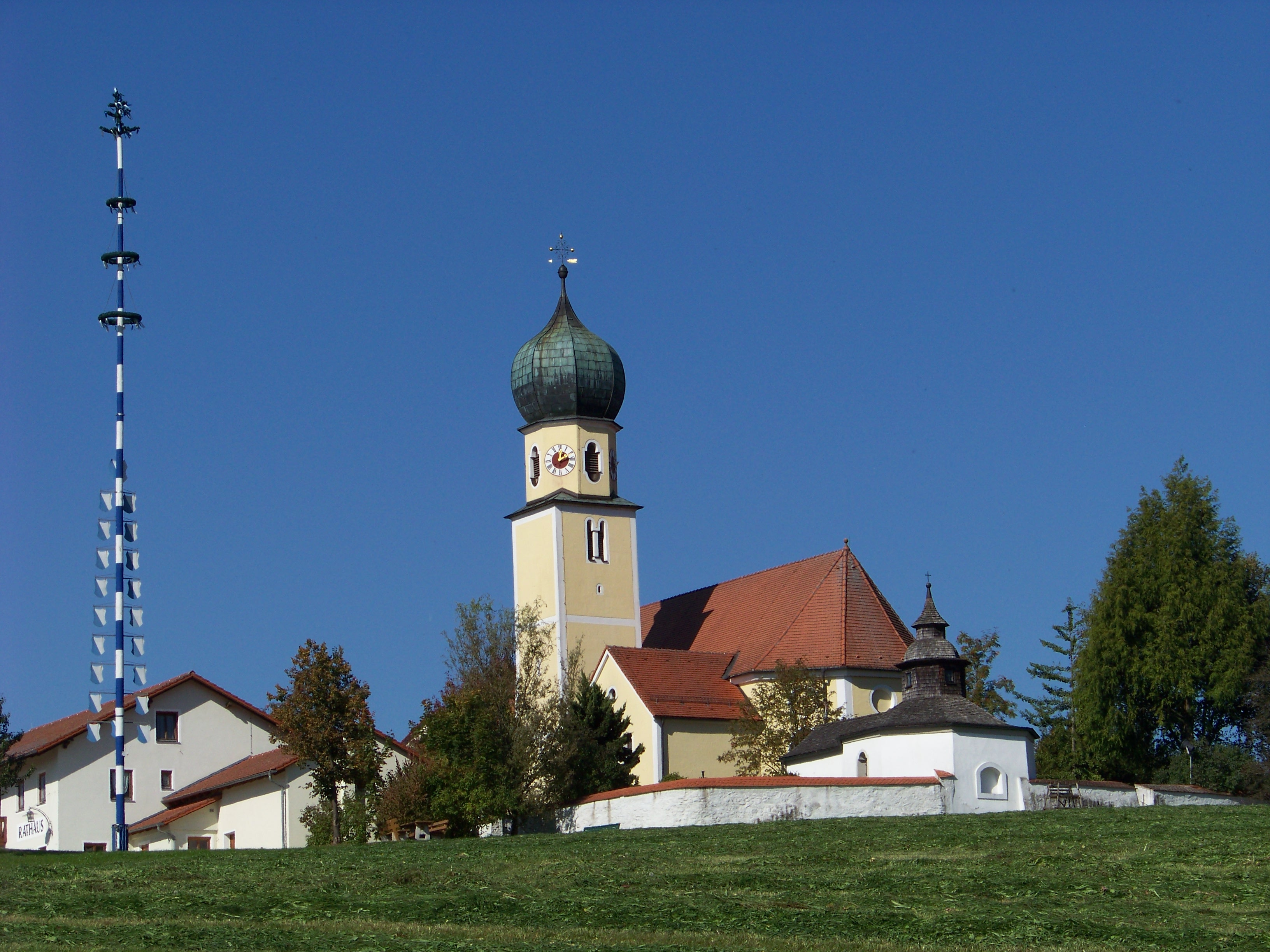 Haselbach in Niederbayern. Kirche St. Jakobus. Neubau 1713 ff.; mit Ausstattung; Turmuntergeschoß romanisch; Friedhofsmauer, 17./18. Jahrhundert.